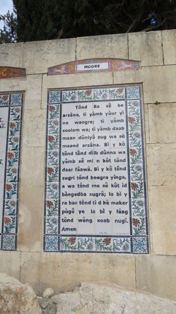 Church of the Pater Noster, Mount of Olives, Jerusalem, Israel כנסיית אבינו שבשמים Sanctuary of the Eleona